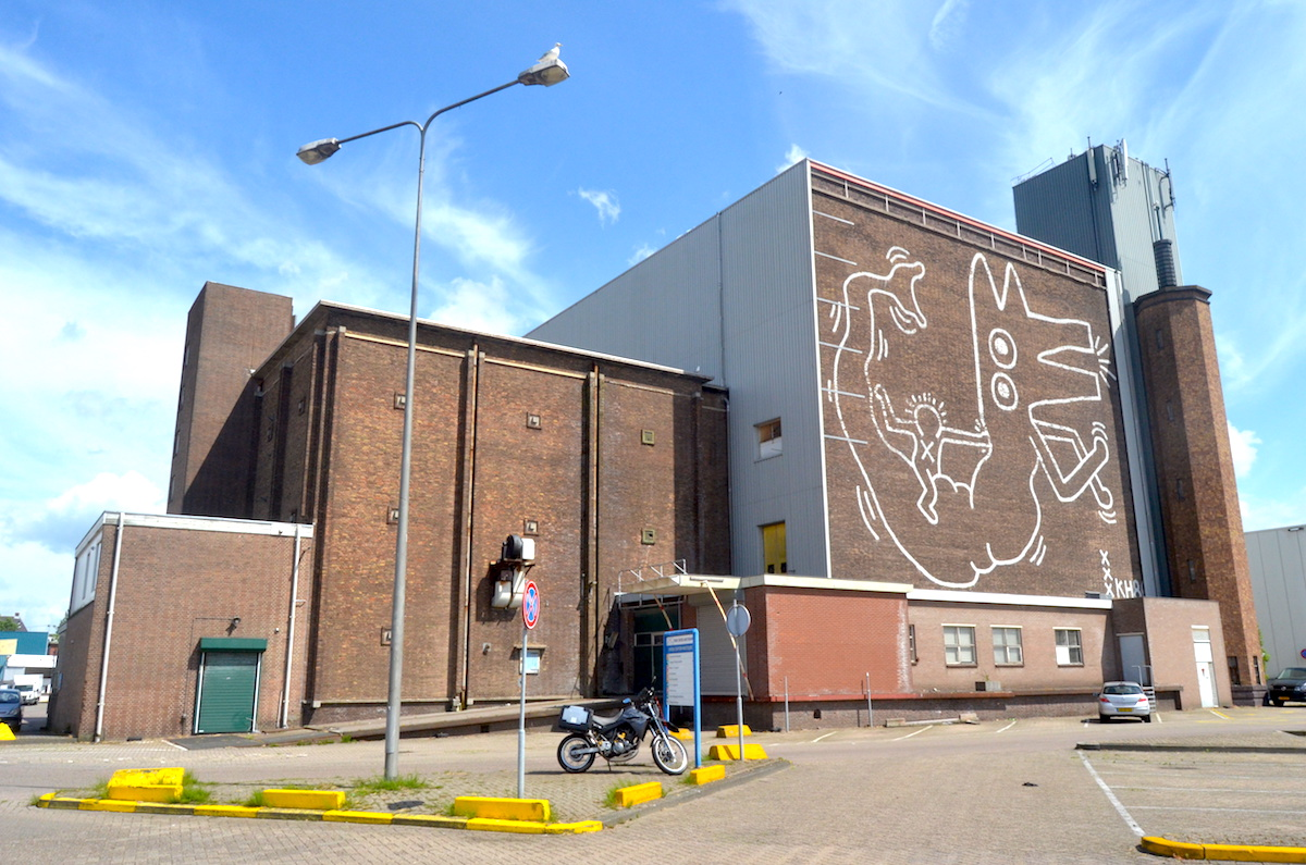 Keith Haring op de Centrale Markthallen te Amsterdam (2); juni 2019. Foto: Erik Swierstra.